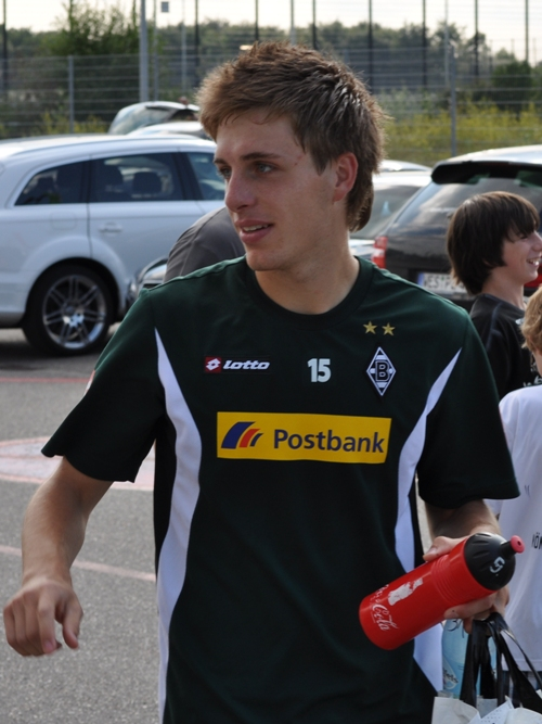 Herrmann beim Training